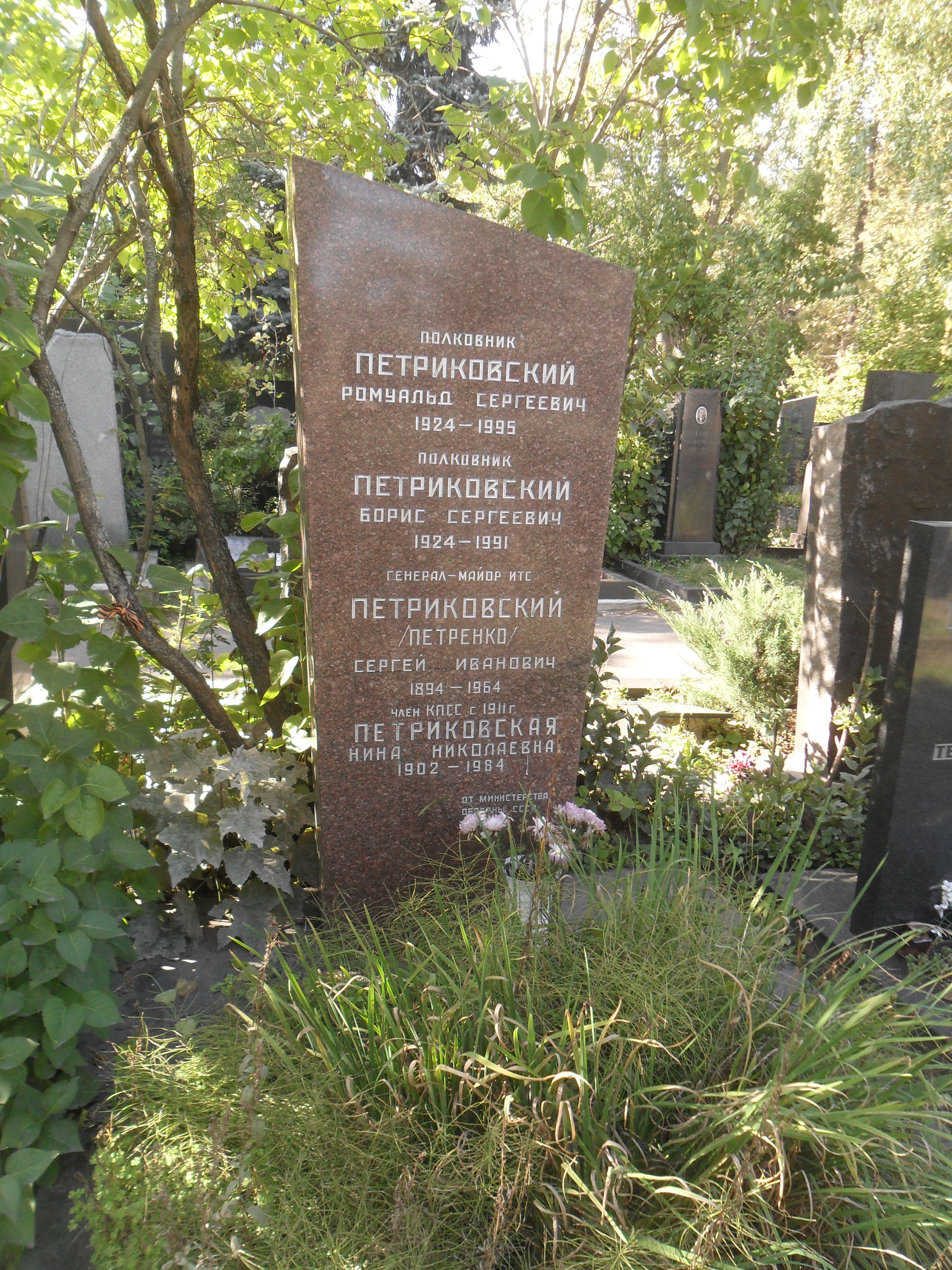 Могила генерал-майора Сергея Петриковского на Новодевичьем кладбище Москвы.